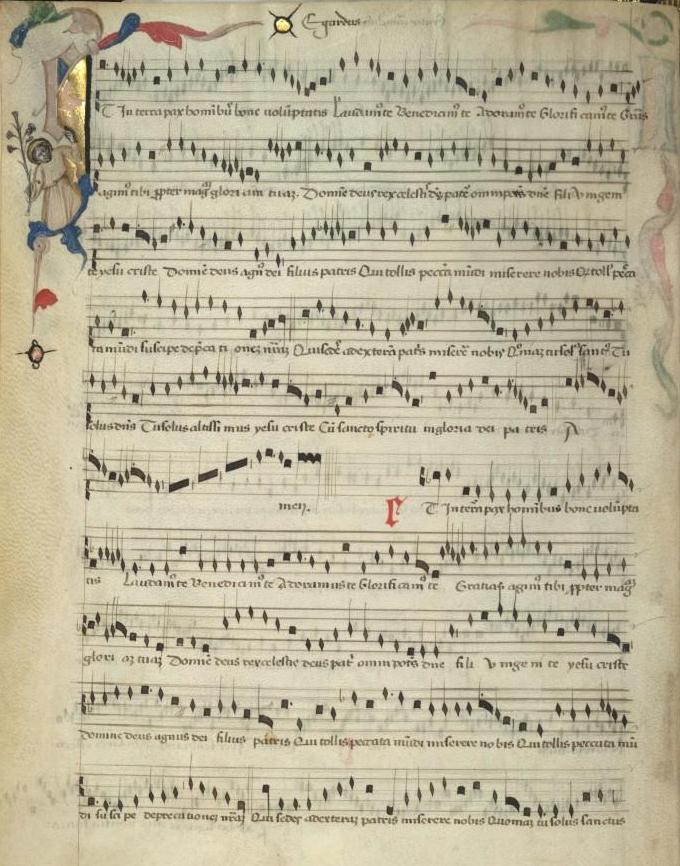 Modena BE α. 5,25